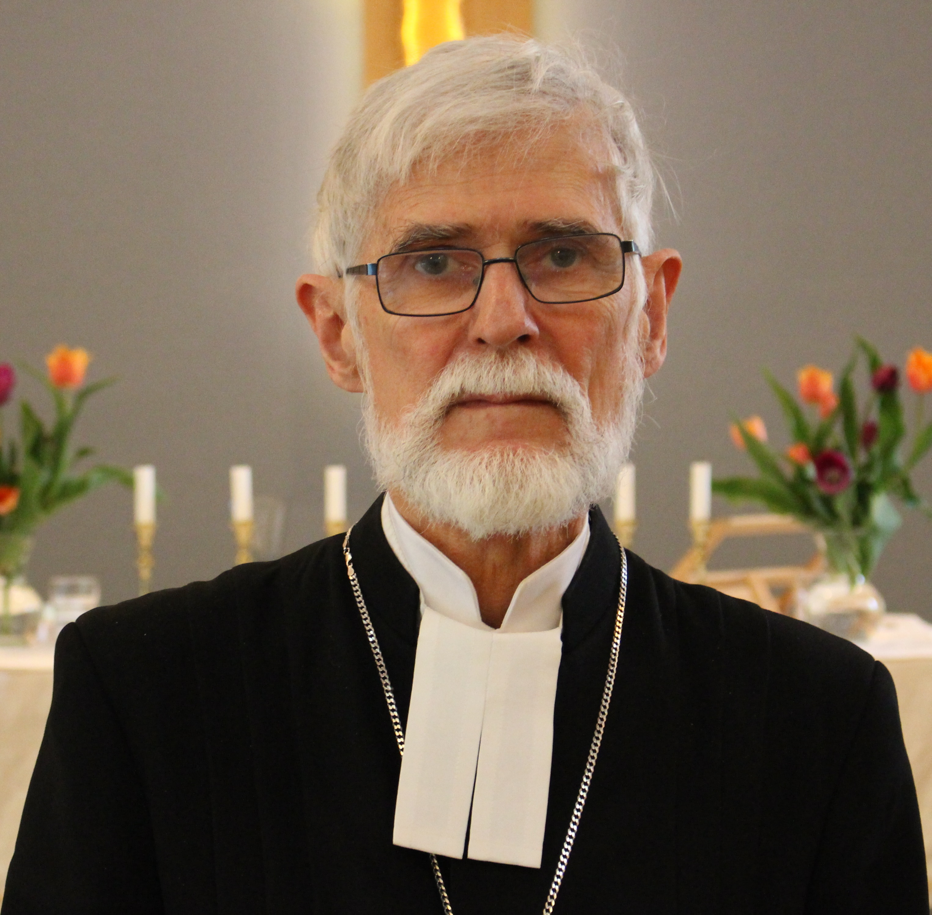 Biskop Bengt Ådahl.